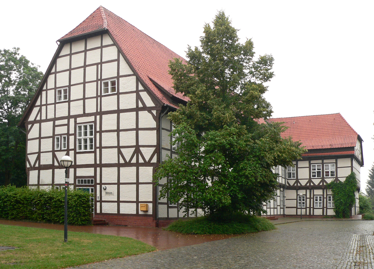 Gebäude des Amt Oldenstadt